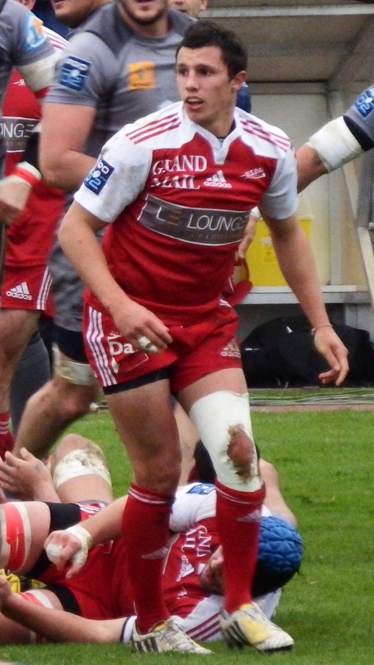 Pro D2 2013-2014 — 24 November 2013, Stade Maurice Boyau. Match between: US Dax — Tarbes Pyrénées rugby